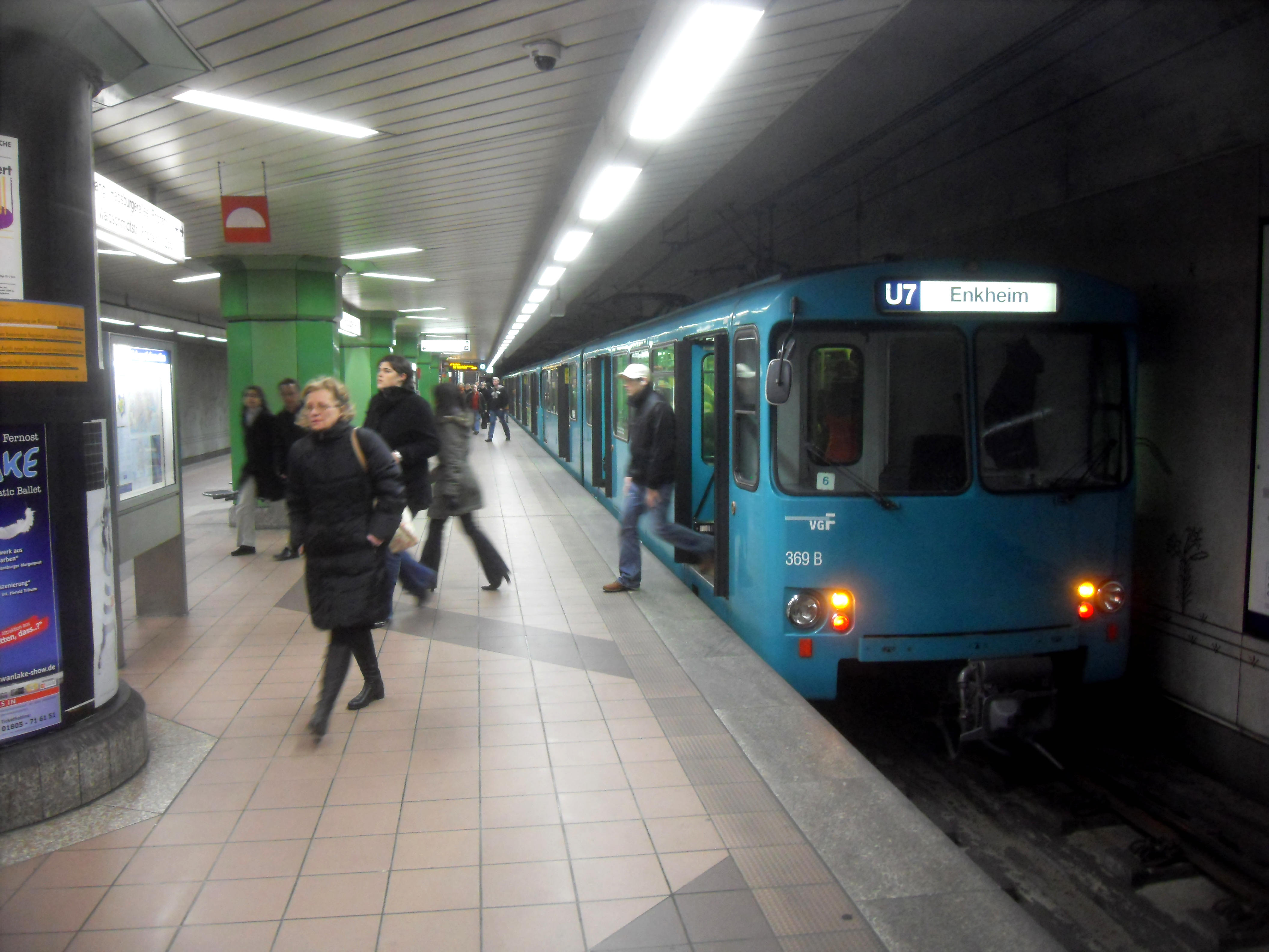 U2-Triebwagen der U-Bahn Frankfurt im U-Bahnhof Habsburgerallee auf der Linie U 7 auf dem Weg nach Frankfurt-Bergen-Enkheim in Hessen (Deutschland)